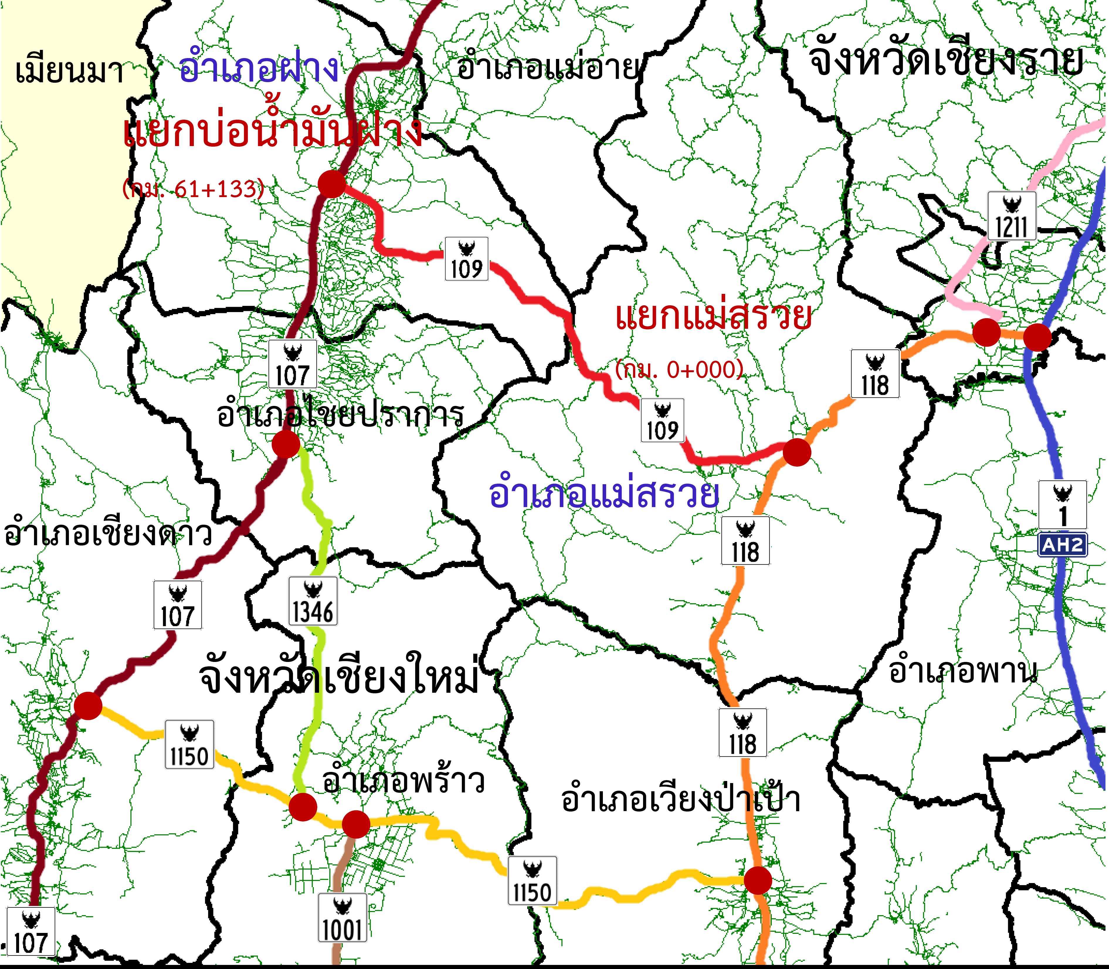 TH HW 109 map 2